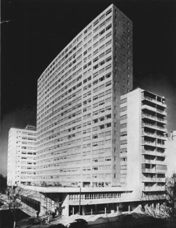 Vista del Edificio Nicolás Repetto, construido por la Cooperativa de Ahorro y Préstamo para la Vivienda Limitada "El Hogar Obrero" entre 1950 y 1955. Se encuentra en la Avenida Rivadavia, esquina Ángel M. Giménez. Barrio de Caballito, ciudad de Buenos Aires, Argentina.